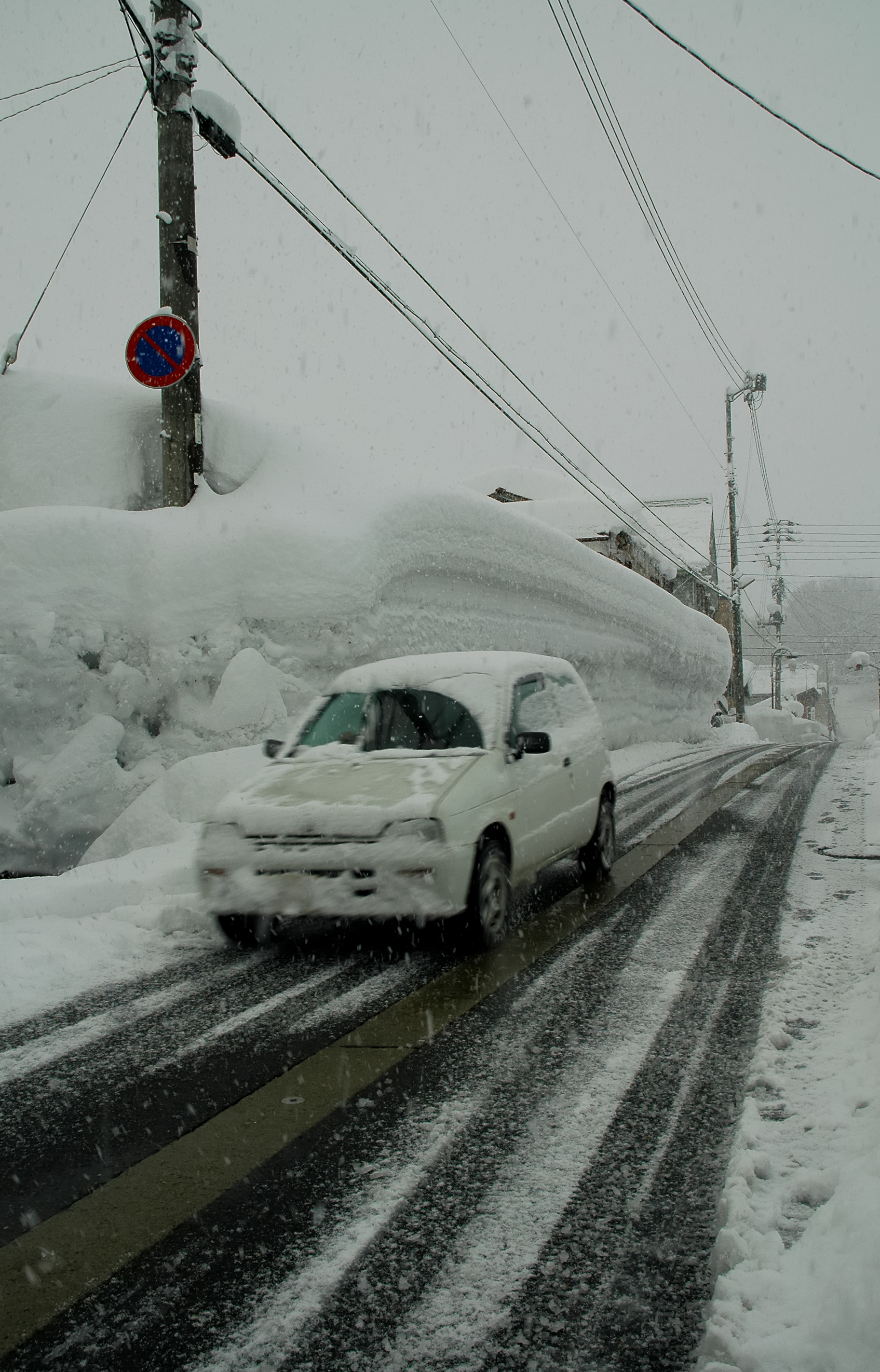 Tsunan (津南町、2006年冬)